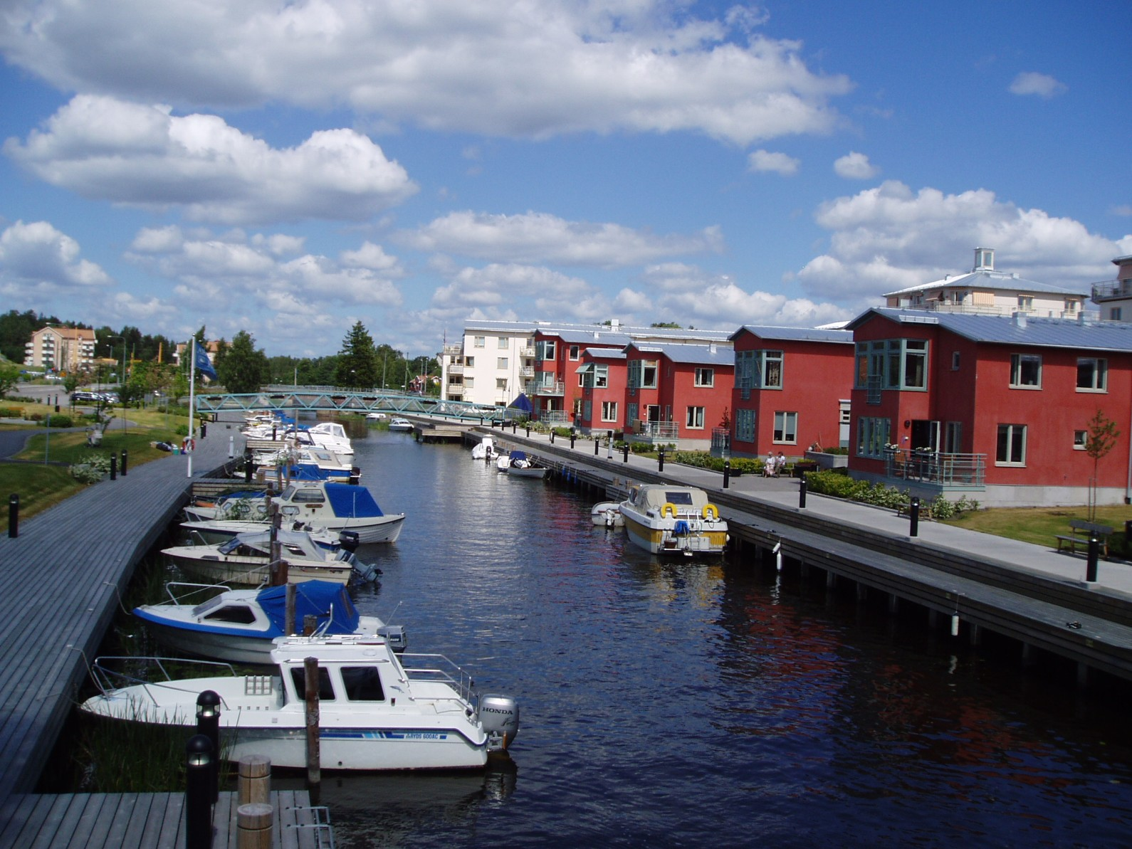 Åkers kanal i Åkersberga photo taken by Udo Schröter